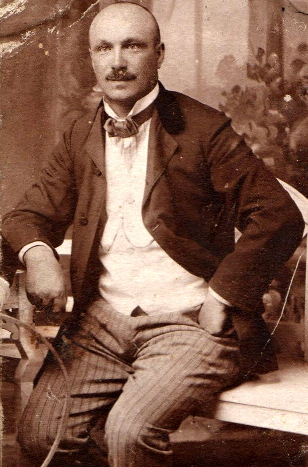 Jindřich Ferenc, český hudební skladatel